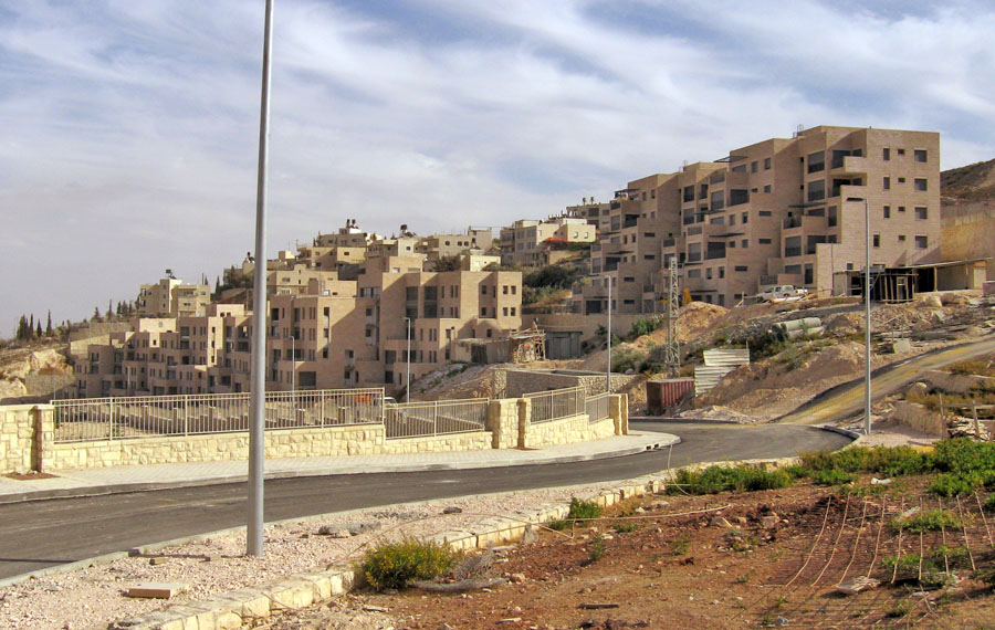 Jabbel mukkabar in Jerusalem